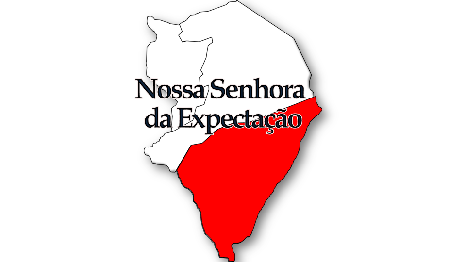 Evolução da População